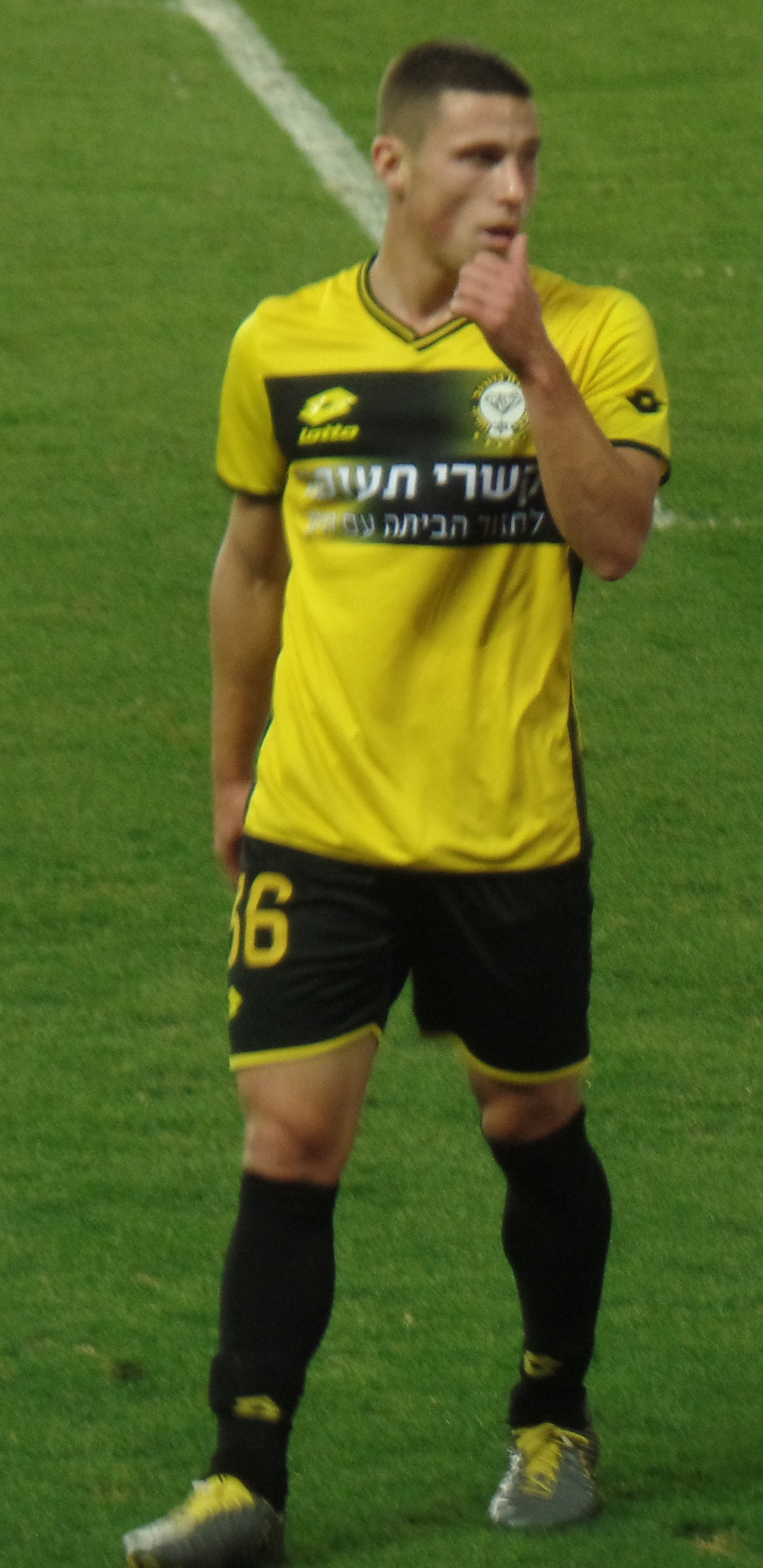 גבי קניקובסקי במדי מכבי נתניה, 2019